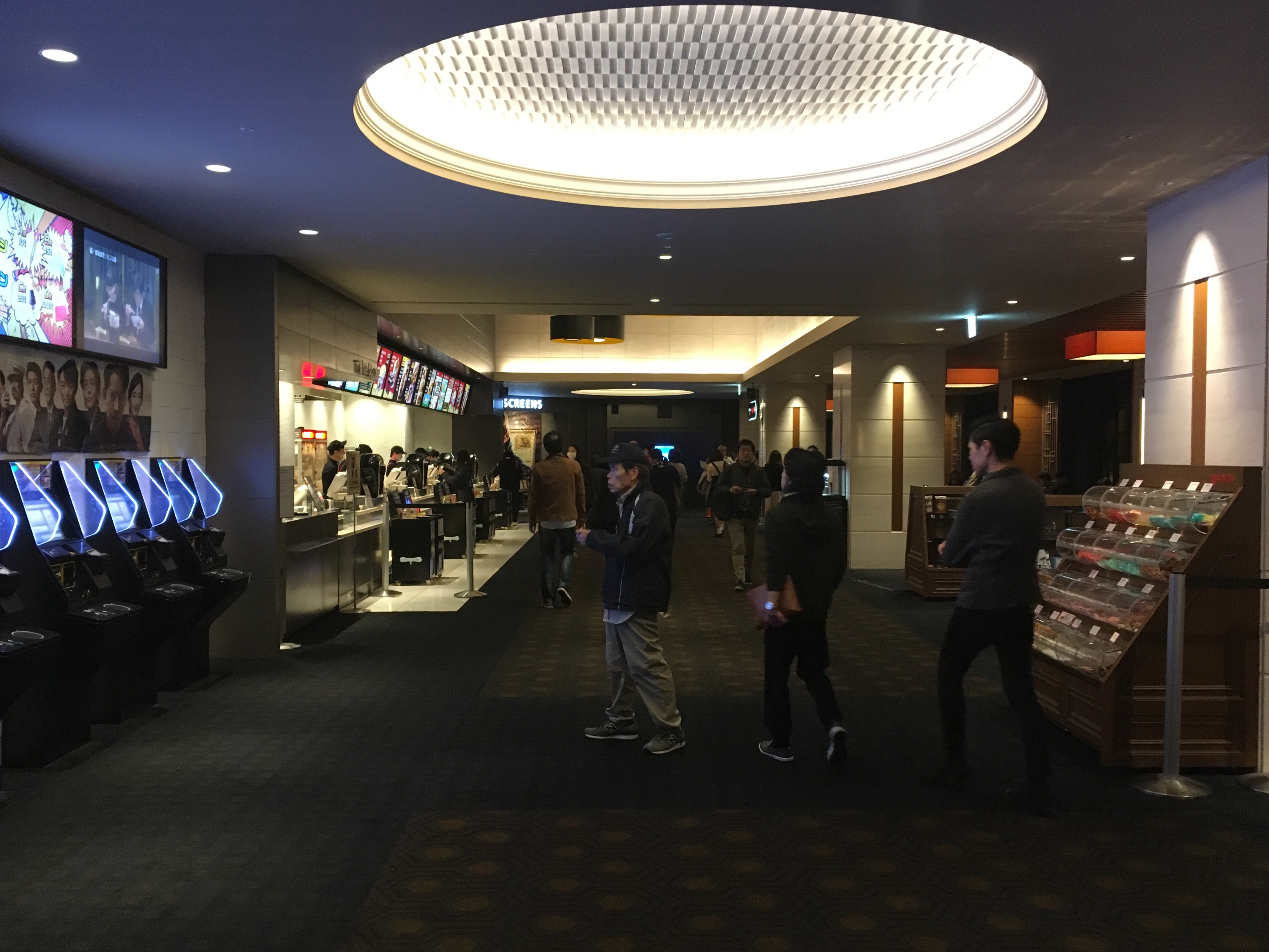 二子玉川の109シネマズ。